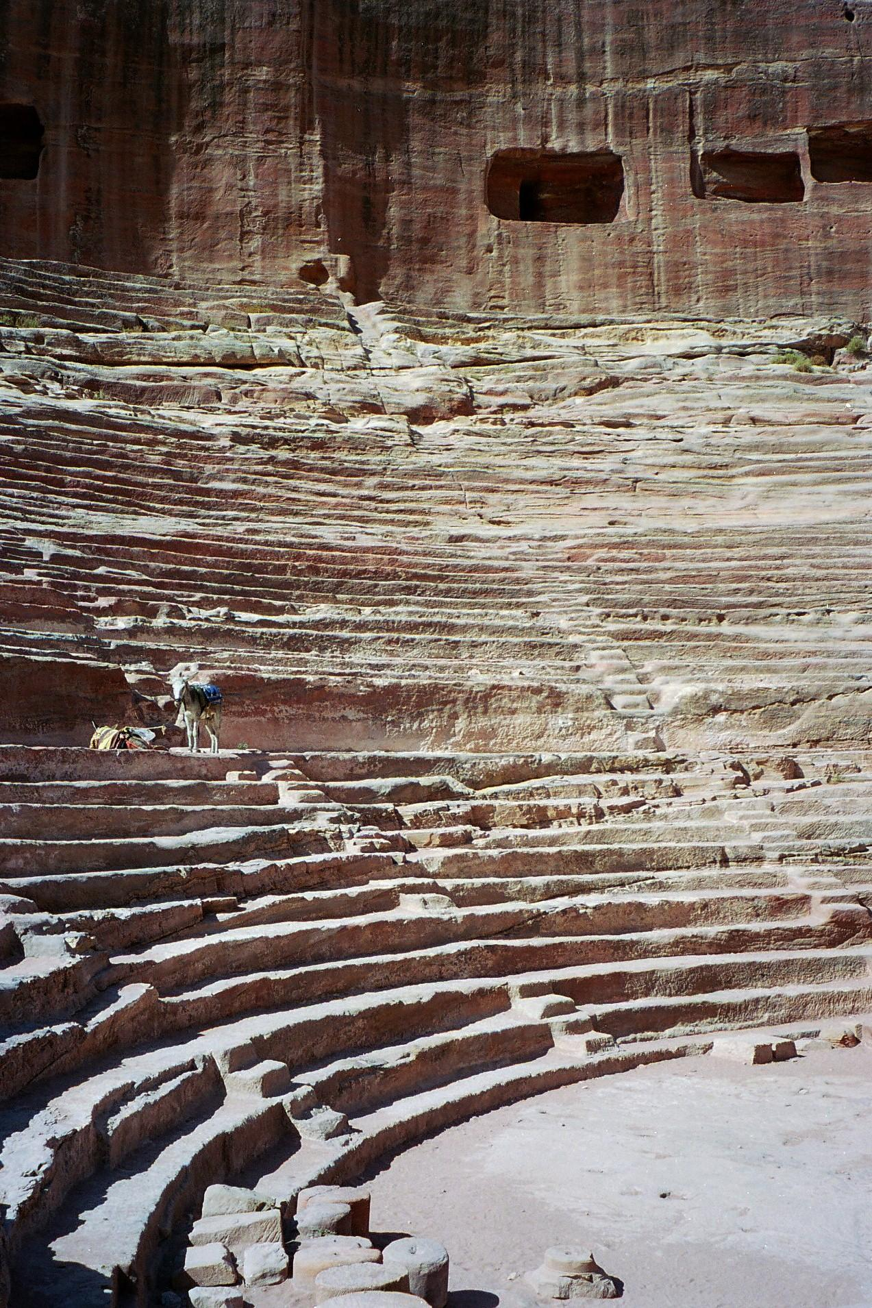 Lonely donkey, Petra roman theater, Jordan âne solitaire sur les gradins du Théâtre antique de Pétra, Jordanie